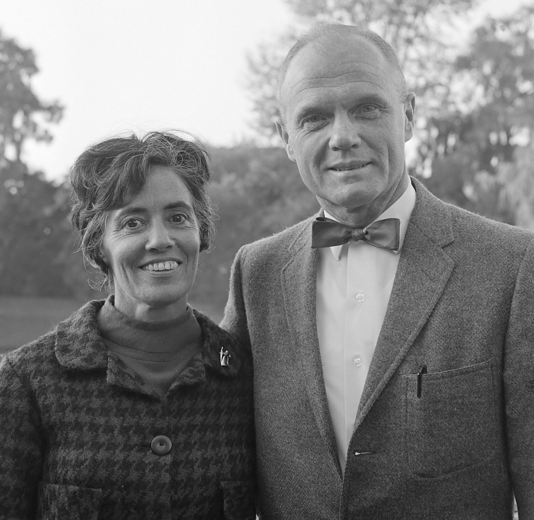 Bezoek aan Nederland van astronaut John Glenn en zijn gezin